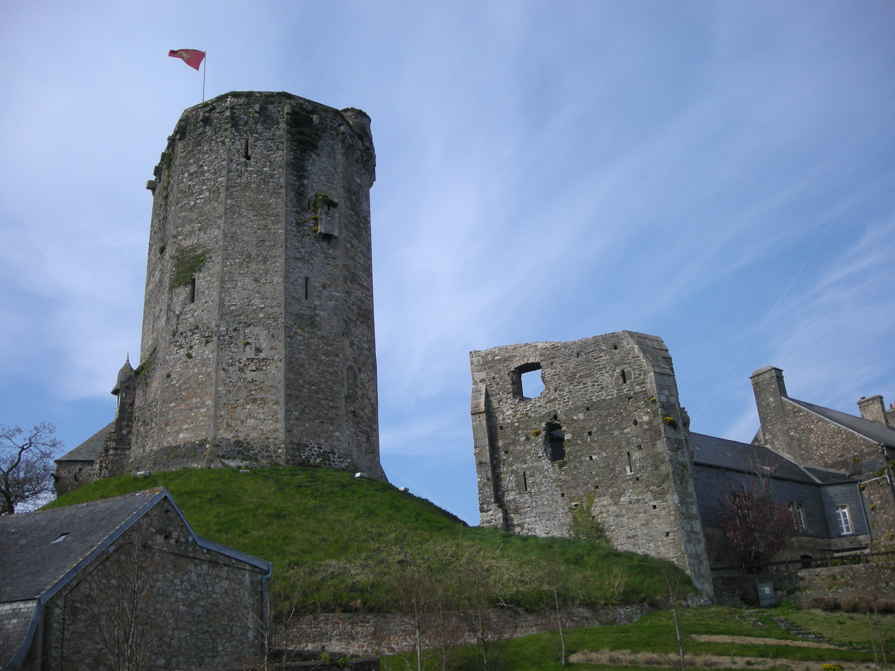 Le donjon du Vieux Château de Bricquebec (Manche, Normandie, France)